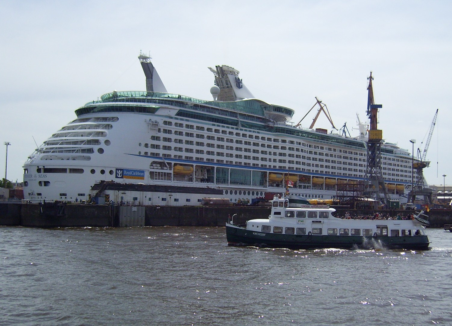 Hafenfähre Kirchdorf